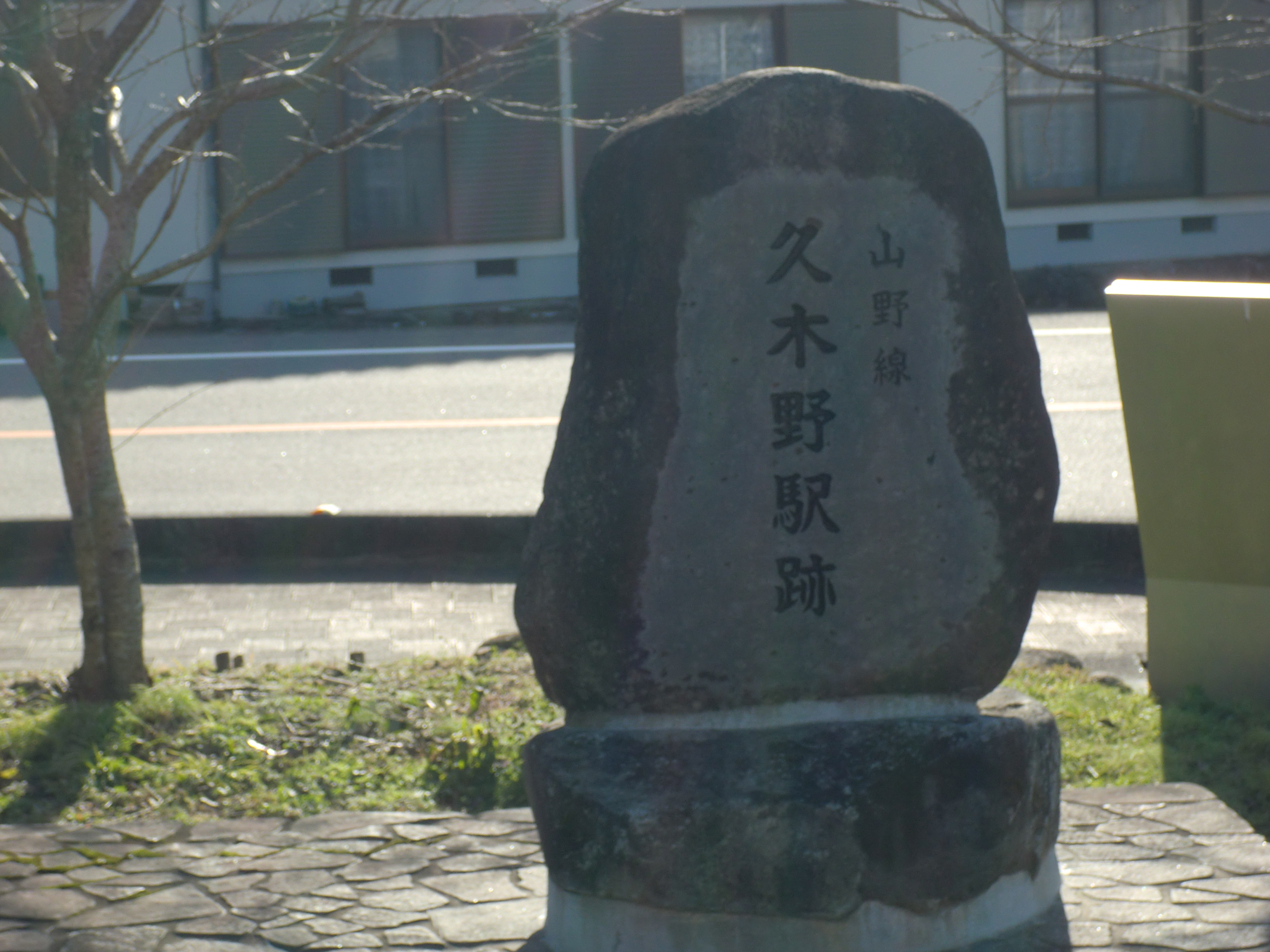 山野線久木野（くぎの）駅跡